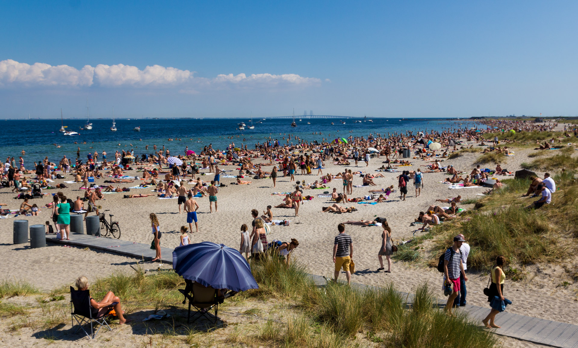 Amager Strandpark in Copenhagen, Denmark